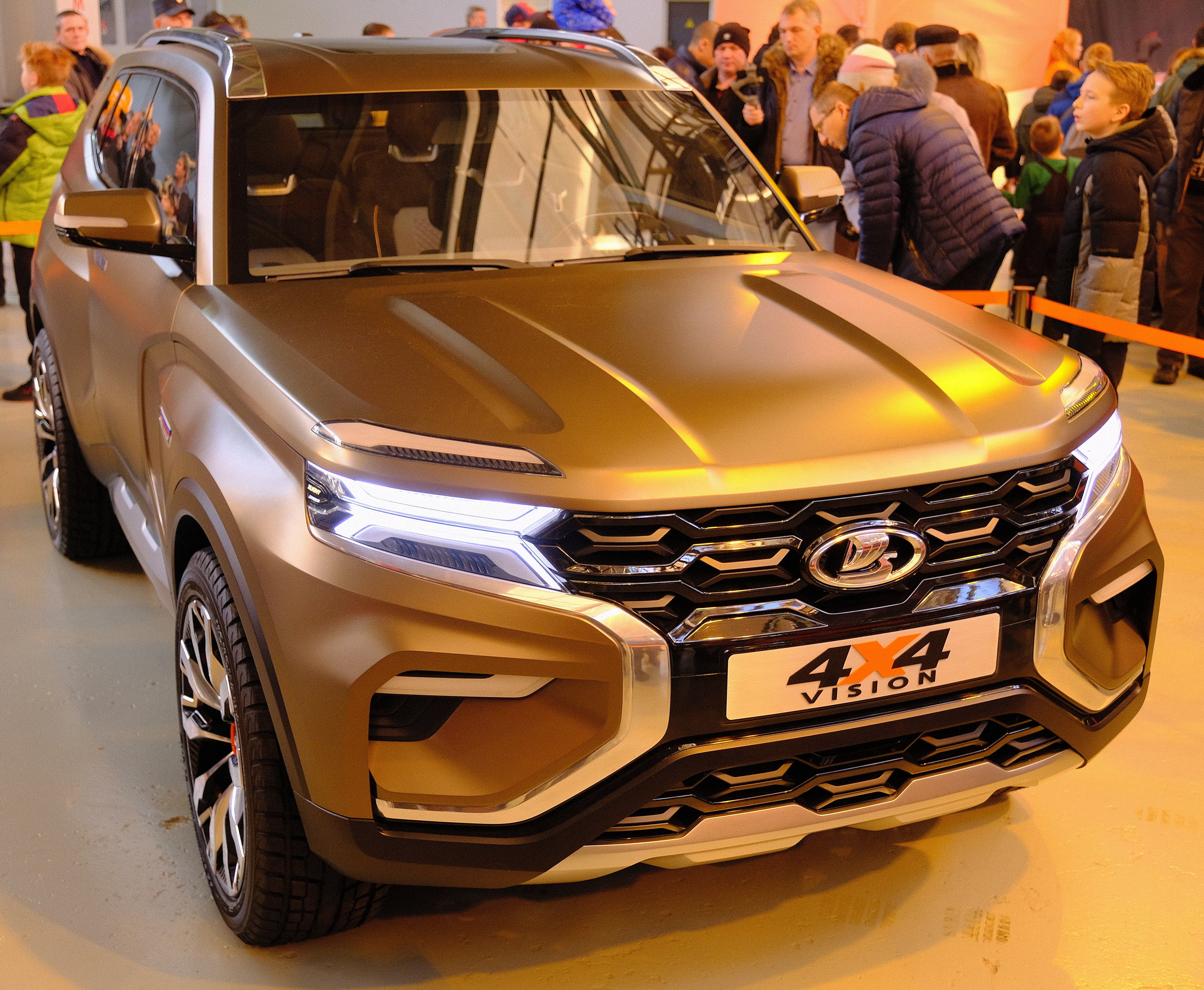 Концепт Lada 4x4 Vision на презентации 14 декабря 2019 года на Ижевском автозаводе